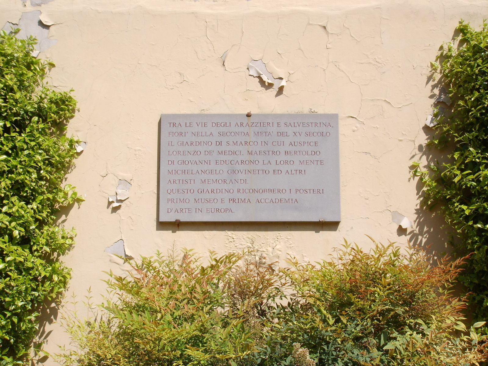 Lapide nel Giardino di san Marco a Firenze.